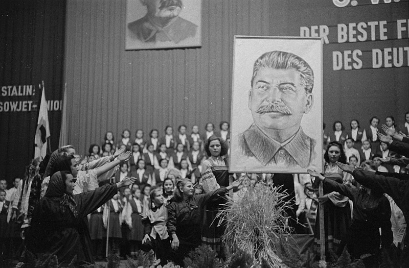 Original image description from the Deutsche Fotothek Chöre mit einem Porträtbild Stalins auf der Bühne